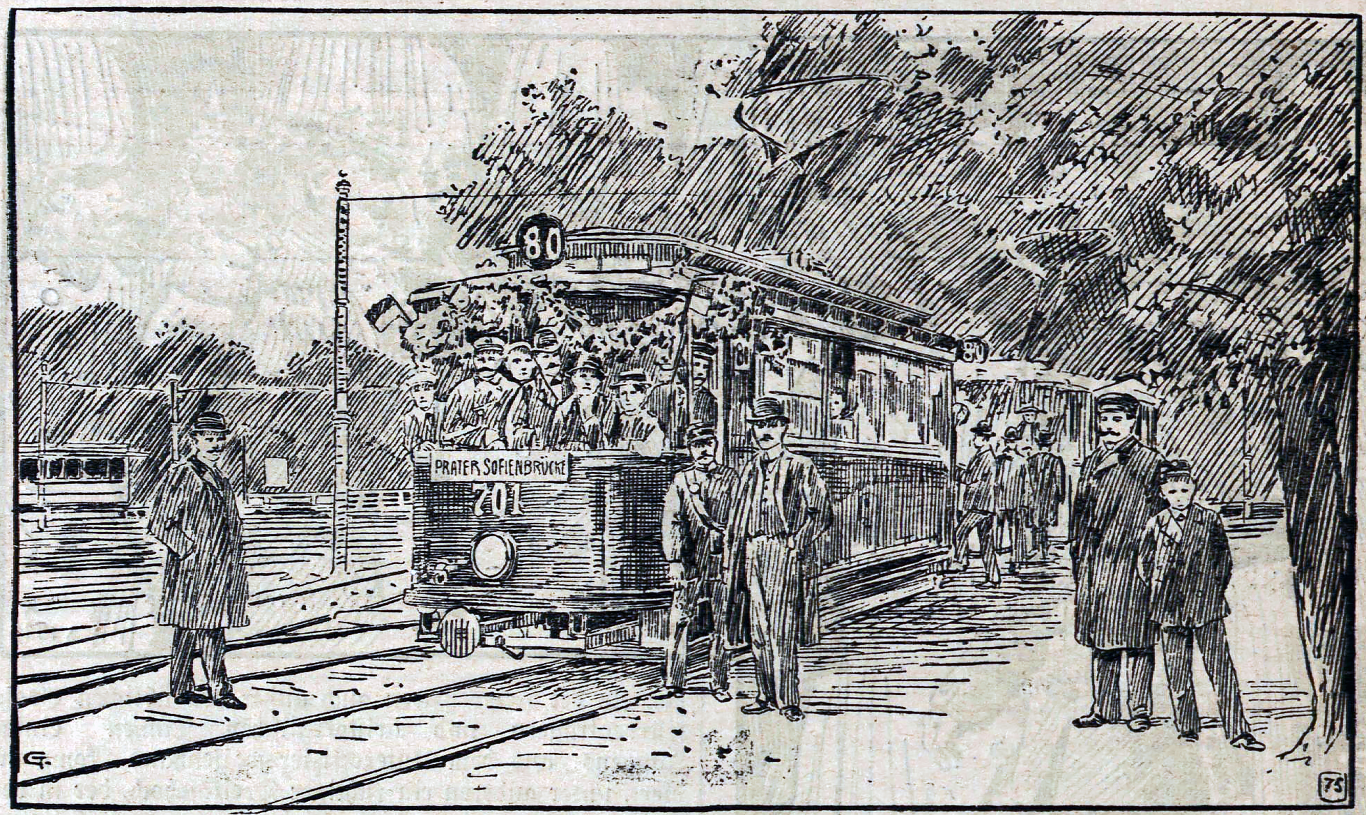 Wien, Leopoldstadt, Eröffnungszug Straßenbahnlinie 80, Lusthaus-Freudenau, 2. September 1909